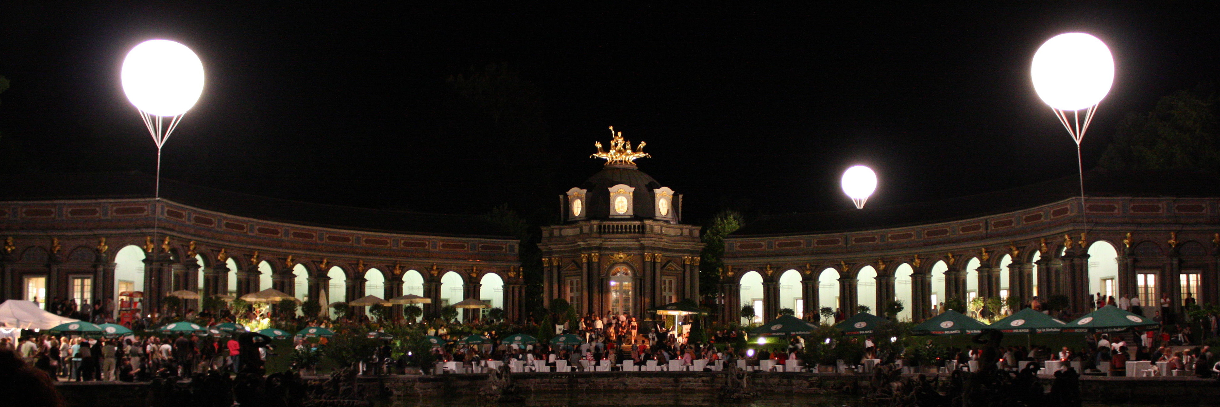 Neues Schloß der Eremitage zu Bayreuth zum Somernachtsfest 2008